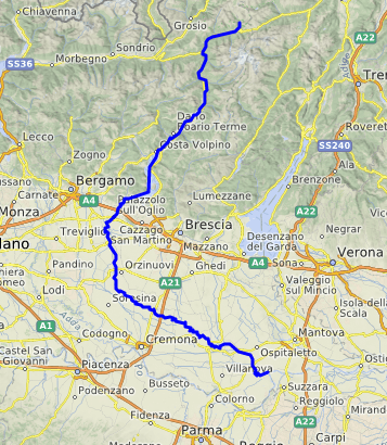 carte réalisée sur umap This map may be incomplete, and may contain errors. Don't rely solely on it for navigation.